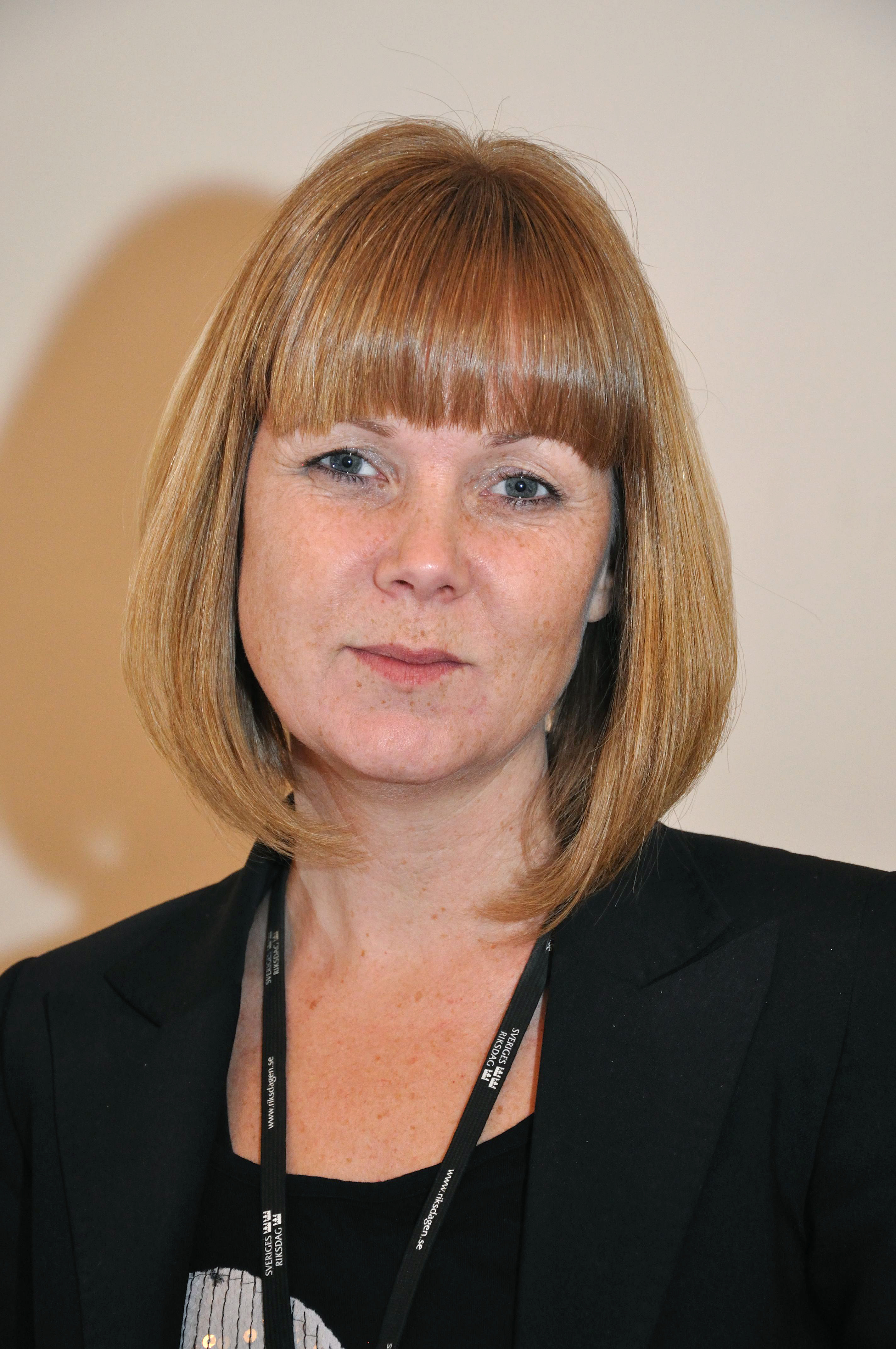 Jennie Nilsson